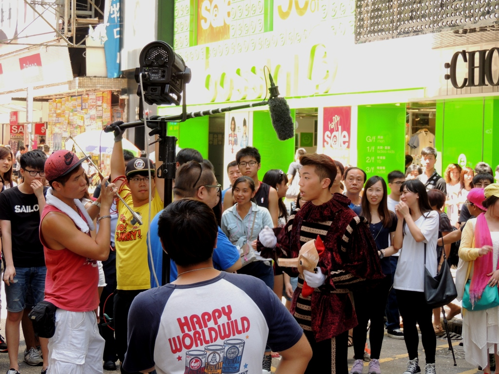 電視廣播有限公司劇集《愛·回家》於香港旺角街頭拍攝外景戲。